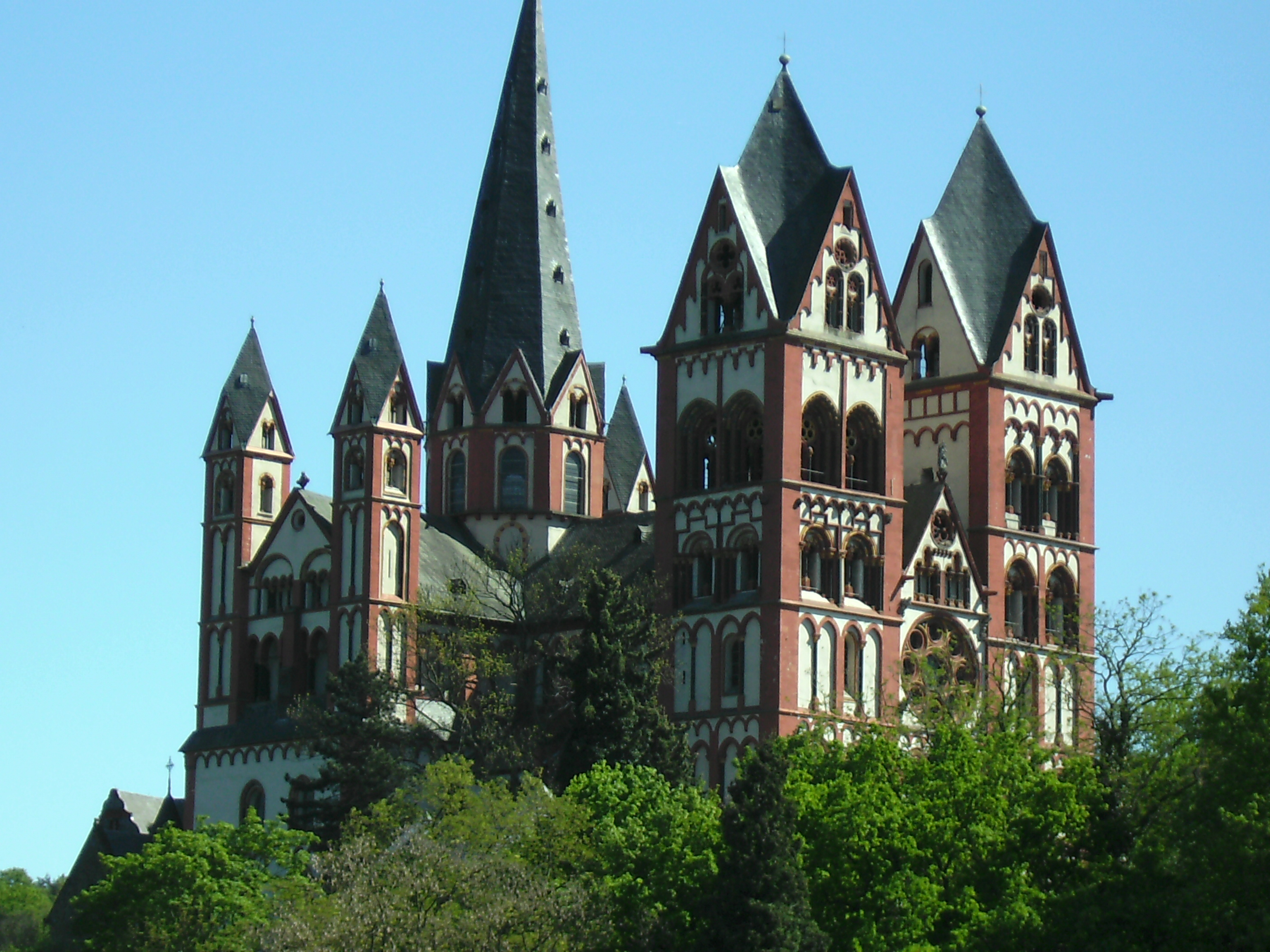 fLimburger Dom, von der Lahnbrücke aus gesehen